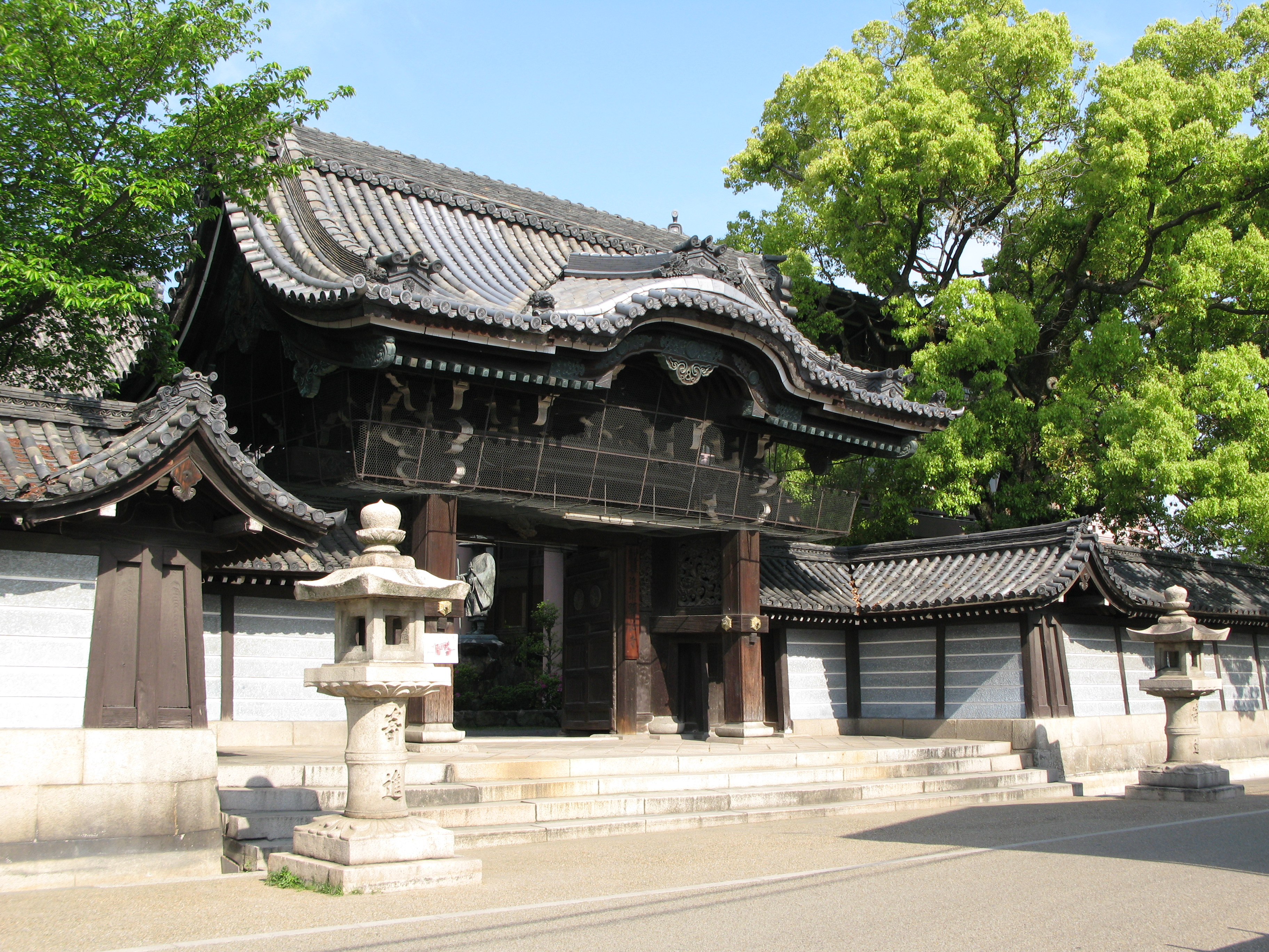 Kenshoji in Yao, Osaka, Japan